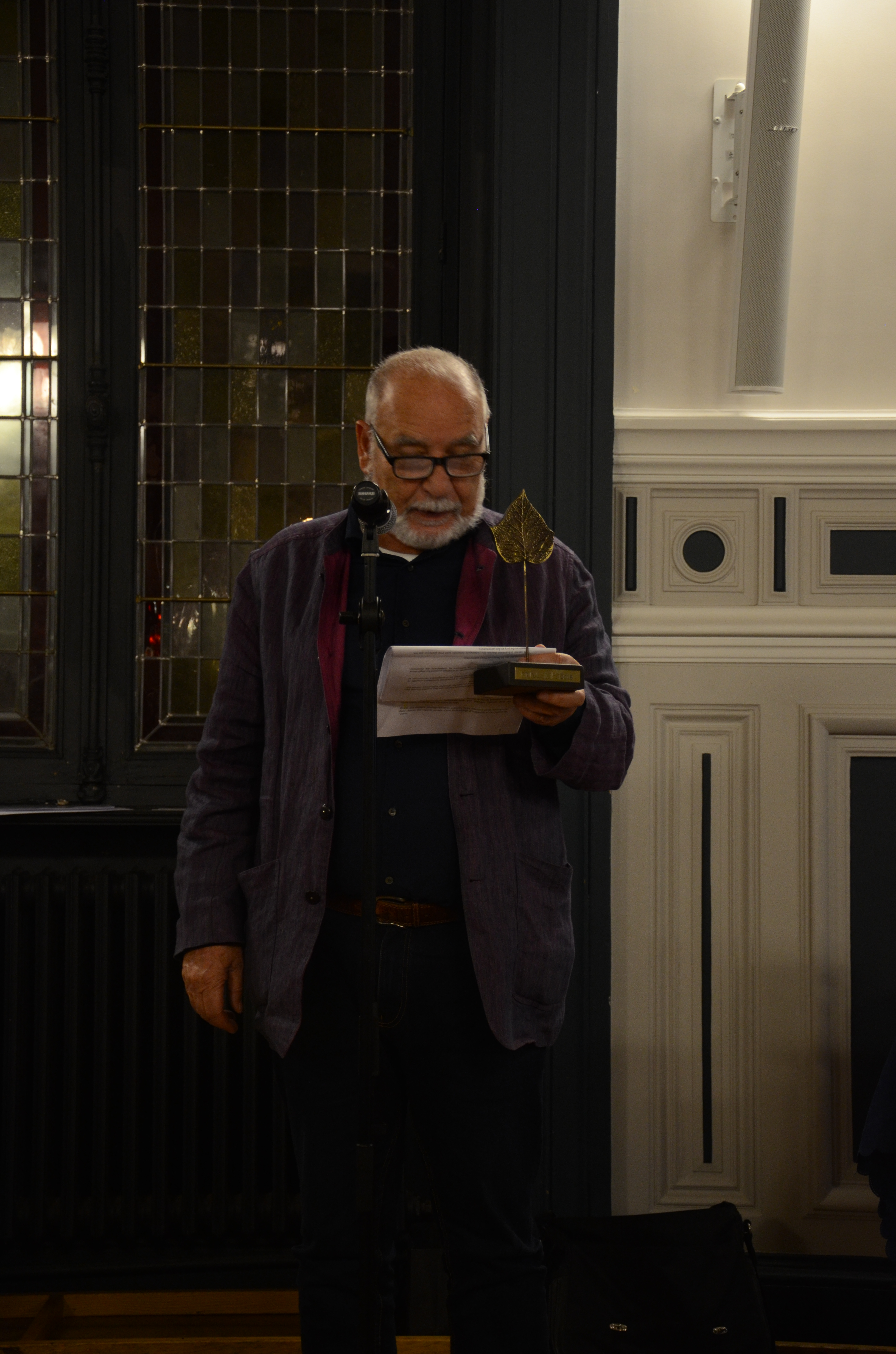 Lors de la cérémonie de remise du Prix CatalPa 2018, Tahar Ben Jelloun, Président d’honneur 2018, lancé dans son éloge du catalogue primé, « Tadao Ando, le défi ».